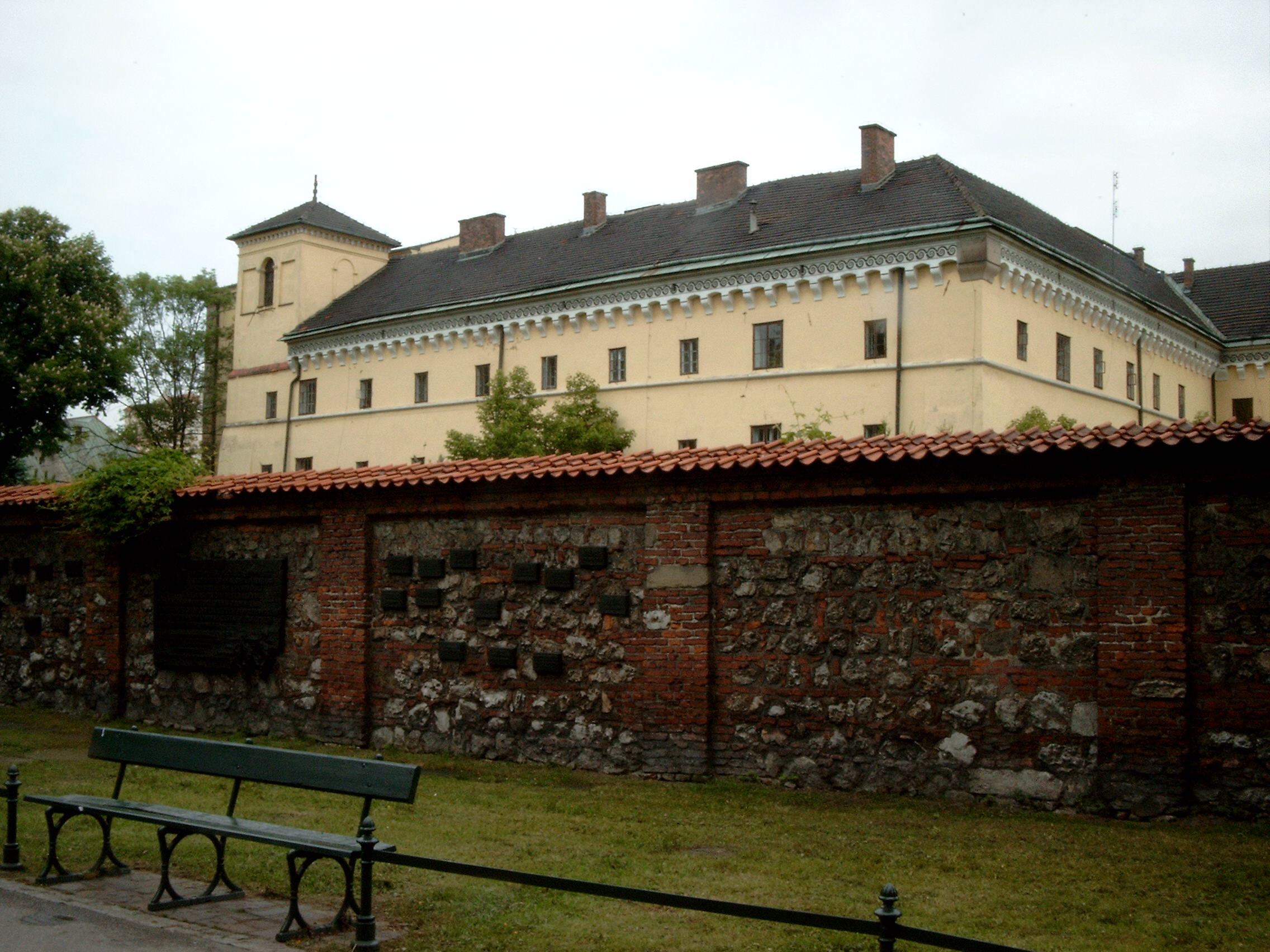 Muzeum Archeologiczne w Krakowie od strony Plant